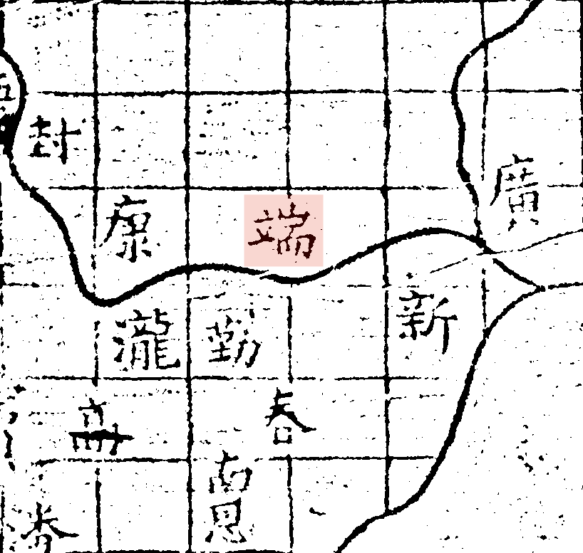 粵語: 禹跡圖入面嘅端州